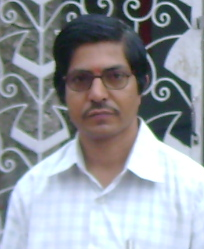 నా ఛాయాచిత్రం